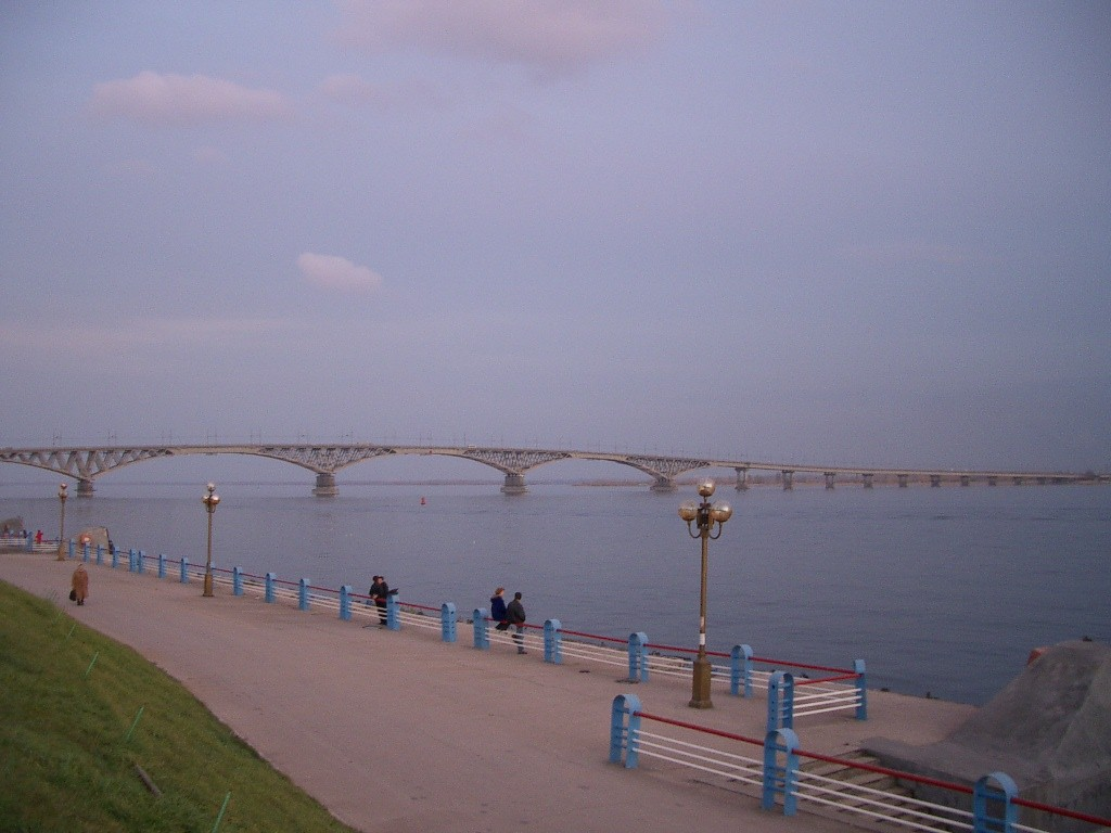 Alte Brücke über die Wolga zwischen Saratow und Engels